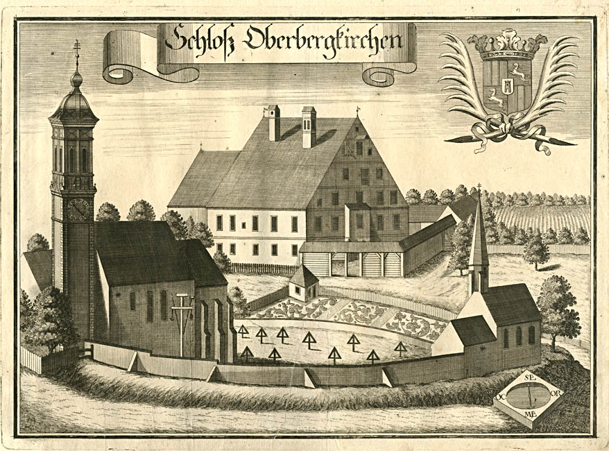 "Schloß Oberbergkirchen", aus : Beschreibung des Churfürsten- u. Hertzogthumbs Ober- und Nidern Bayrn. Rentamt Landshut, Gericht Neumarkt St. Veit., 1723